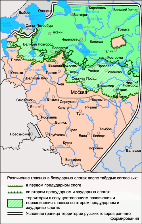 Карта произношения гласных в безударных слогах после твёрдых согласных в русских окающих говорах. Источники: Захарова К. Ф., Орлова В. Г., Сологуб А. И., Строганова Т. Ю. Образование севернорусского наречия и среднерусских говоров / Ответственный редактор В. Г. Орлова. — М.: «Наука», 1970. — С. 149 (Карта 40. Вокализм 2-го предударного и заударных слогов после твёрдых согласных) Бромлей С. В., Булатова Л. Н., Гецова О. Г. и др. Русская диалектология / Под ред. Л. Л. Касаткина. — М.: Издательский дом «Академия», 2005. — С. 38 (Карта 1. Оканье и аканье) — ISBN 5-7695-2007-8.